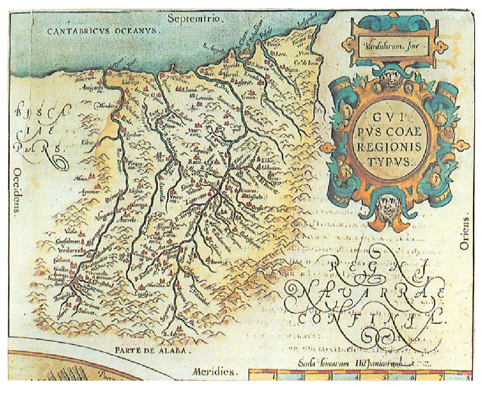 “Guipuscoæ regionis typus”, Ortelius (1603). Lurraldeka egindako lehenengo mapak. Antza denez, Garibaik eman zituen mapa horiek moldatzeko behar ziren datu korografikoak. Lurraldearen kokaerari eta luze-zabalerari dagokionez, mapak ez dira zehatzak, soilik latitudeari buruzko datuak kontuan hartuta (ez beti) osatu baitira. (Vital Kutxa Bilduma).